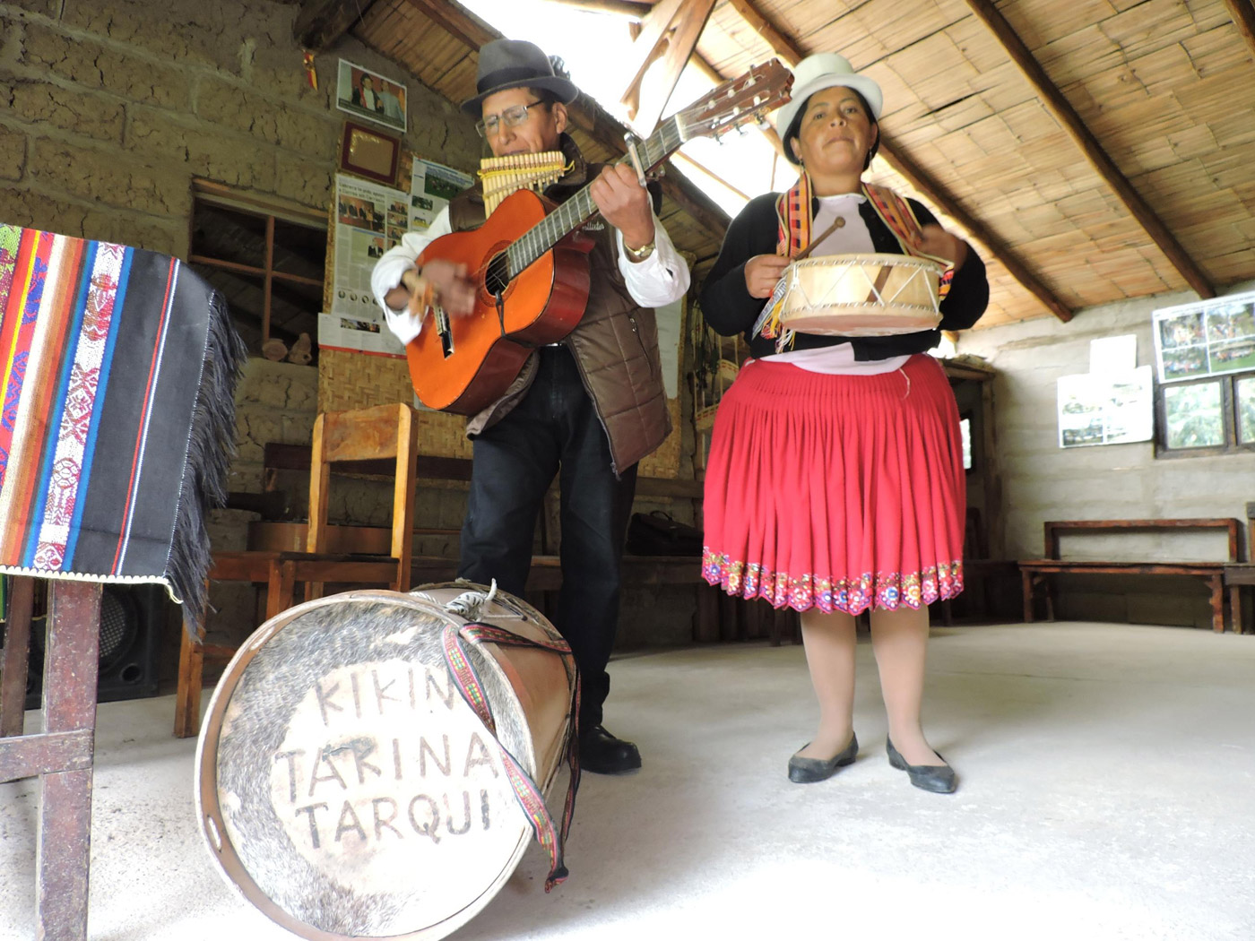 Miembros de la comunidad con instrumentos construidos por ellos mismos.